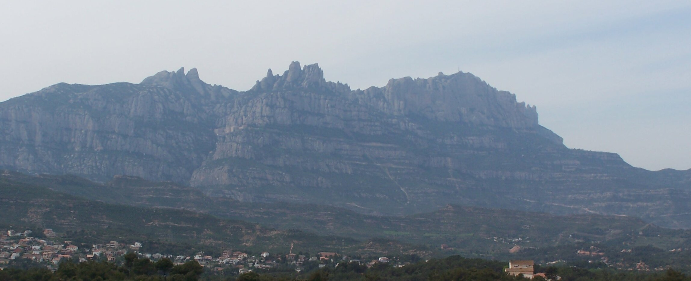 Eigen werk 19-04-2006